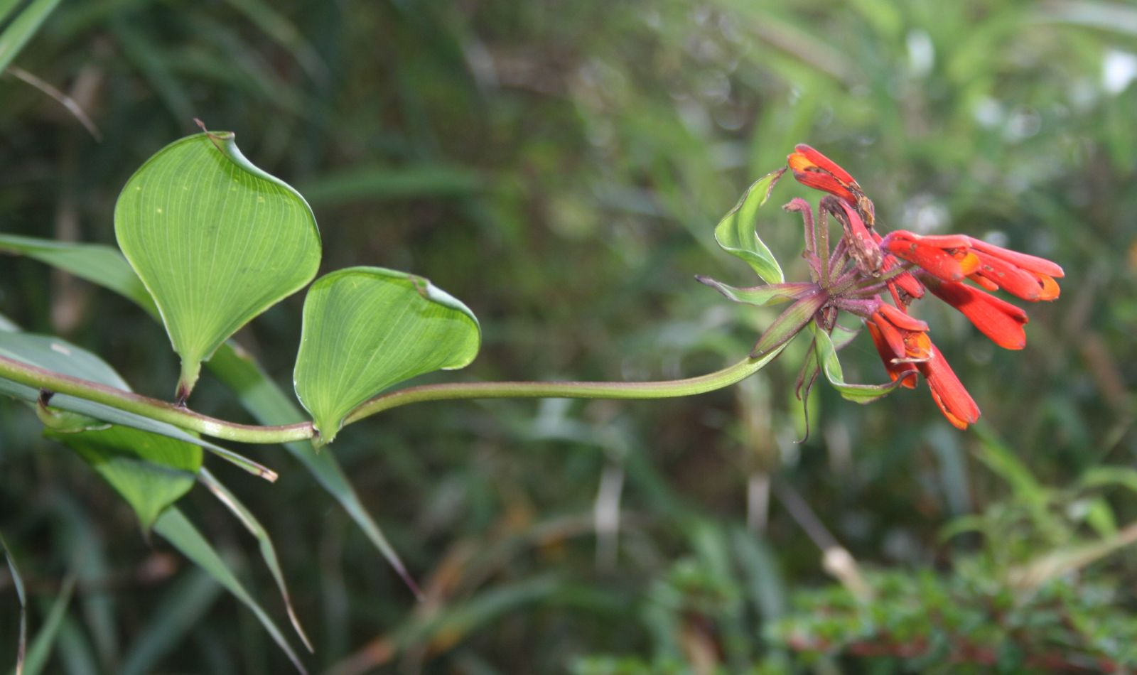 Bomarea hirsuta, Alstroemeriaceae - Costa Rica: Prov. Alajuela, Parque Nacional Volcán Poás, 2550-2600 m